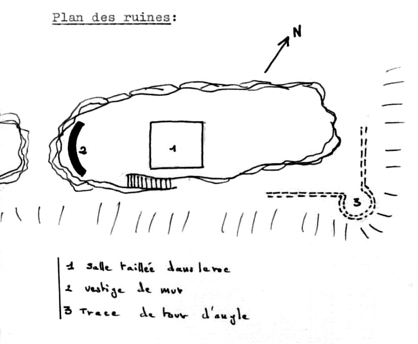 Plan relevé sur le site du Stoerenbourg